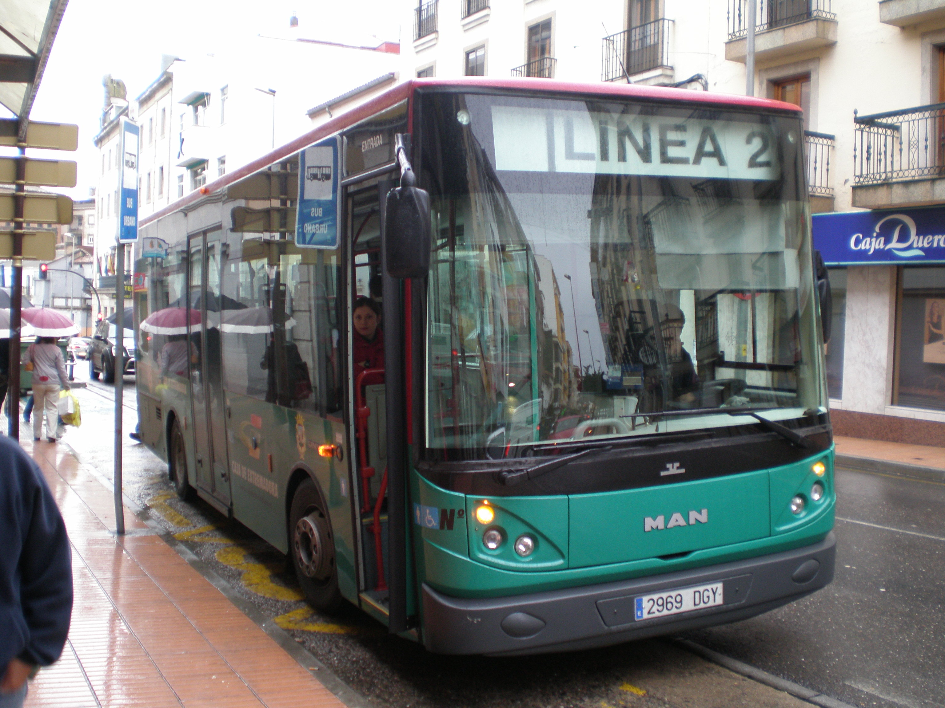 Autobús Unvi urbano de la línea 2 en Plasencia. MAN chassis.